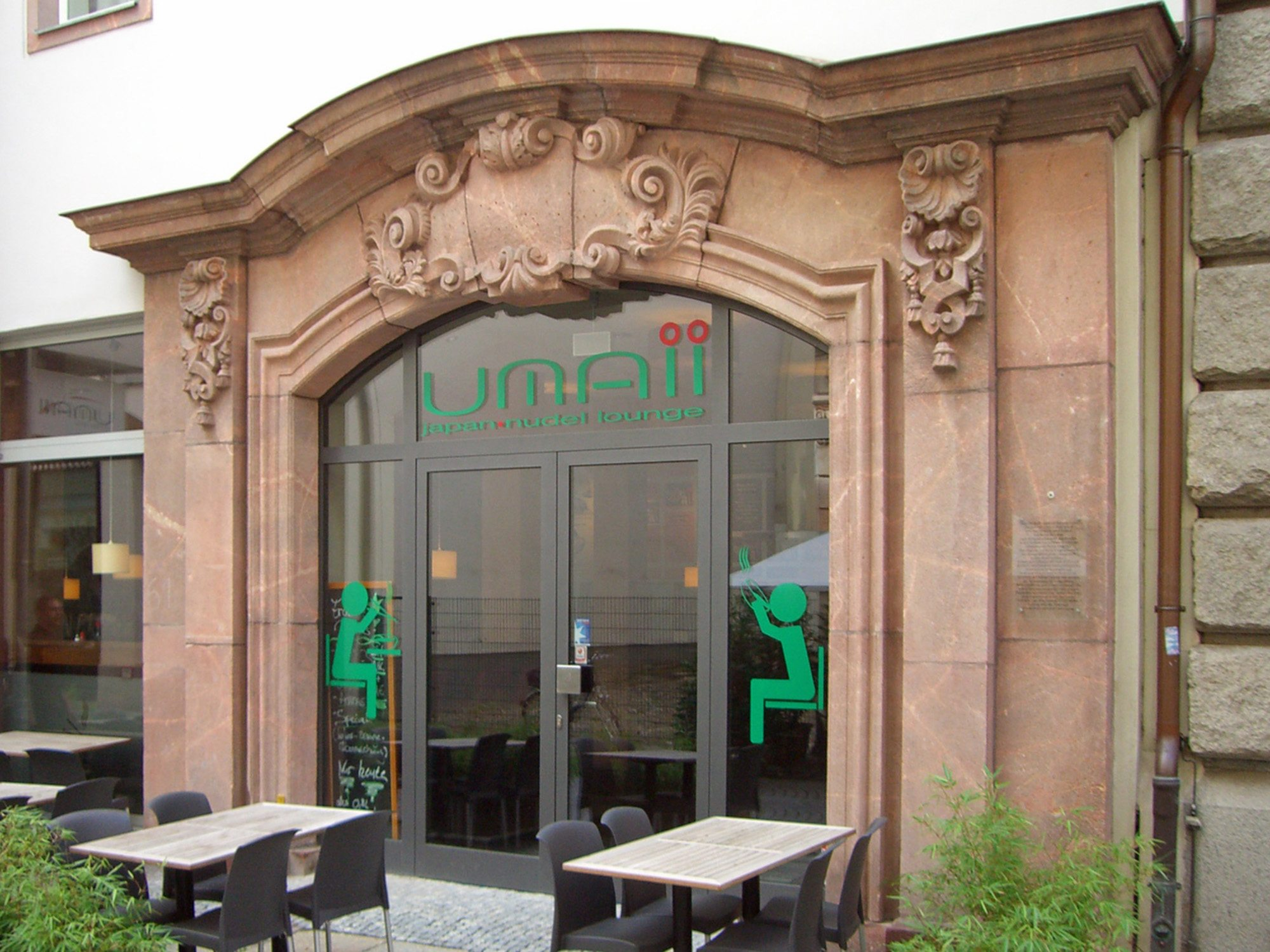 Kopie des Tores vom ehemaligen Hotel des Saxe in Leipzig am Nachfolgerbau Klstergasse 9